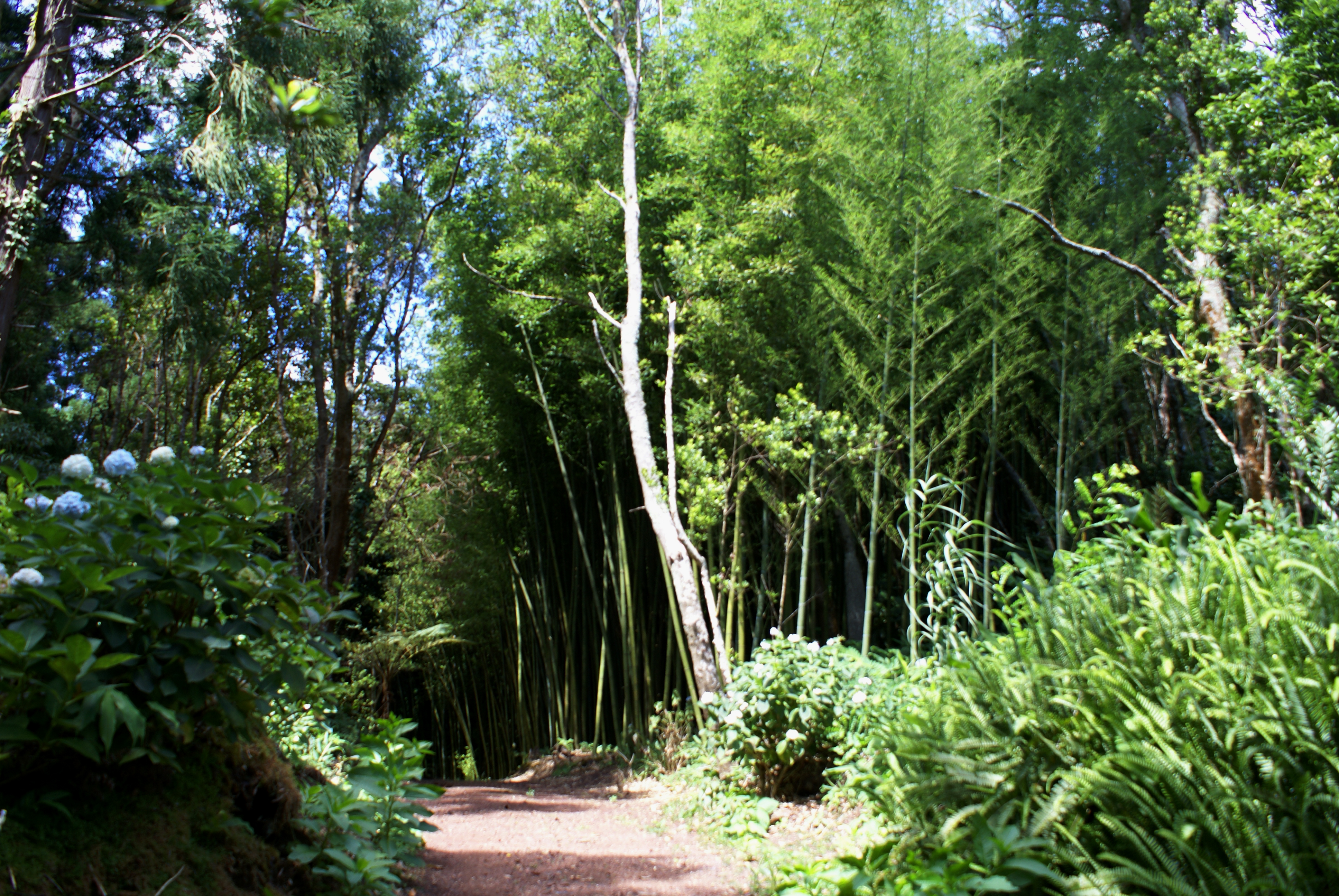 Pinhal da Paz, Ponta Delgada, ilha de São Miguel, Açores